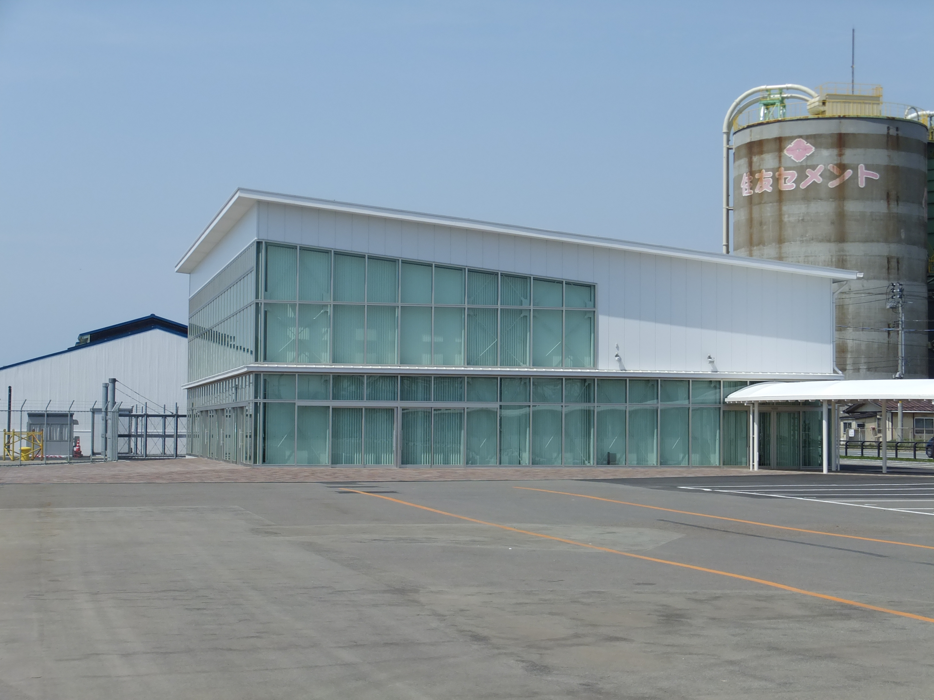 秋田港の中嶋埠頭に整備されたクルーズ船客専用ターミナル